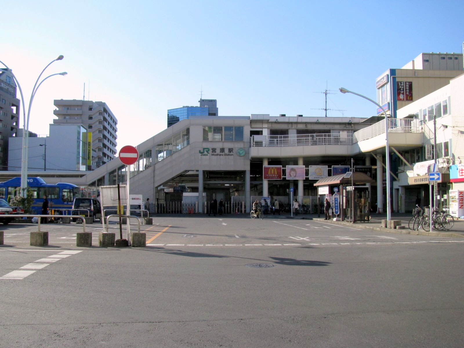 JR宮原駅東口